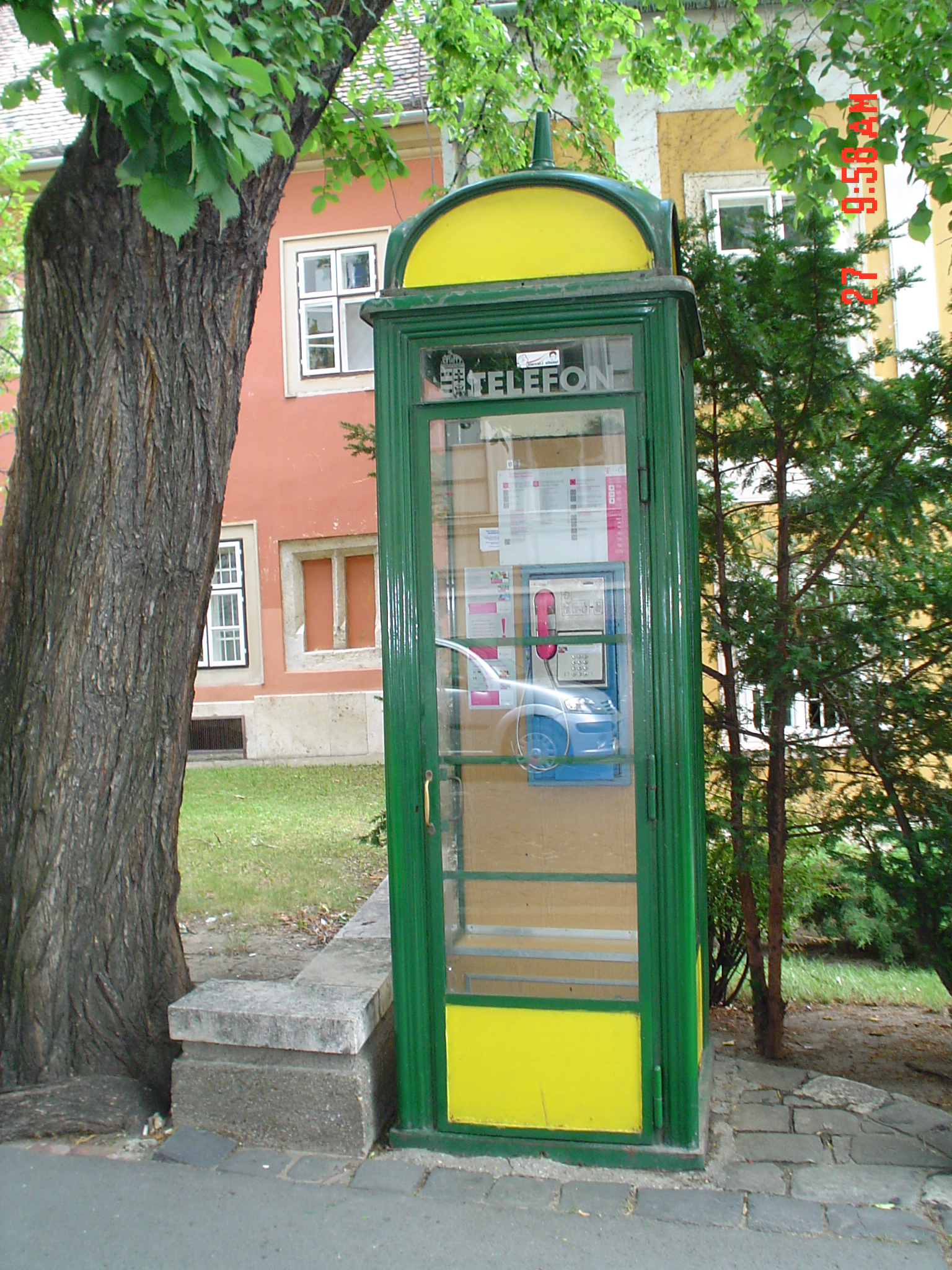 Telefonĉelo en Budapeŝto, Hungario